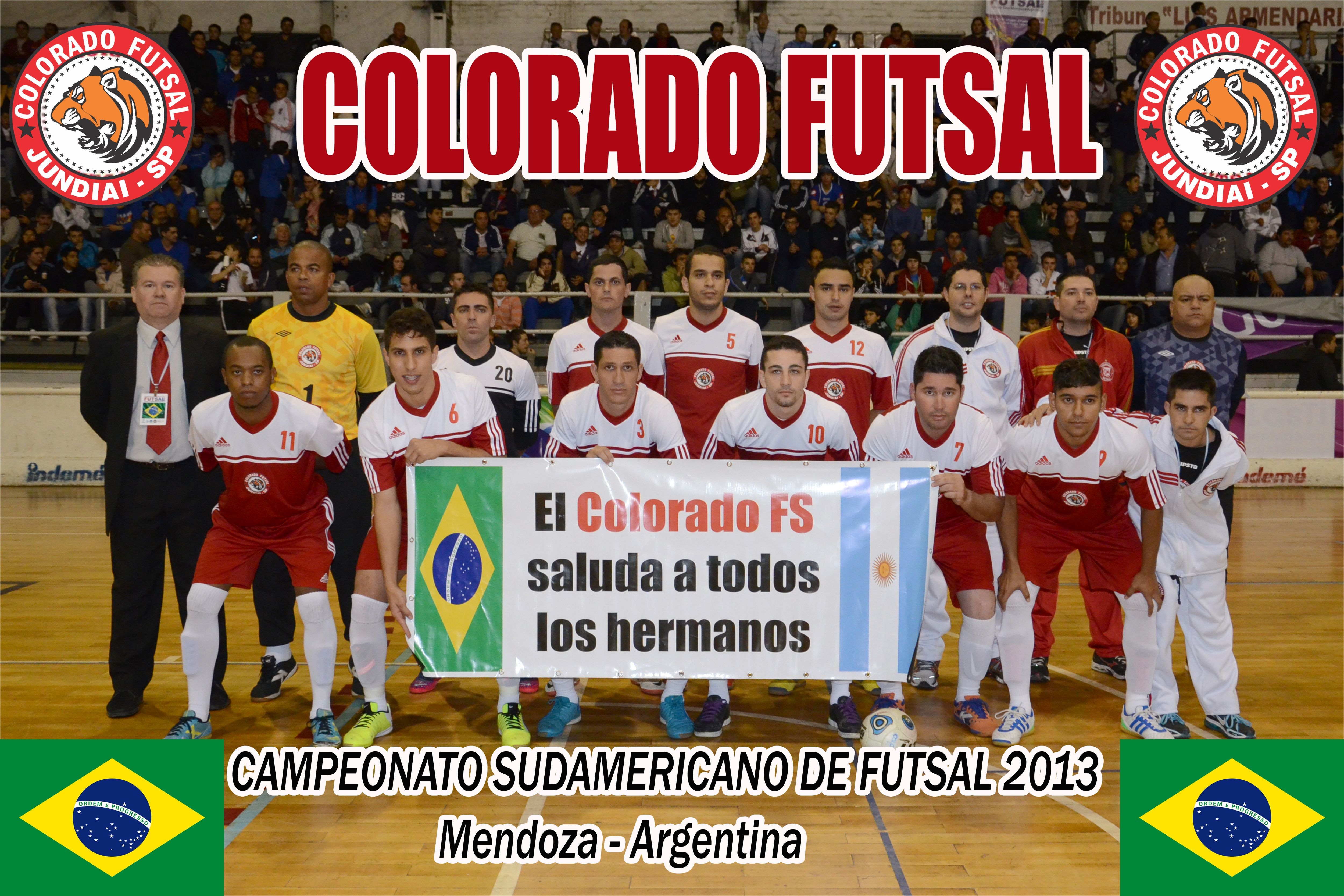 Equipe do Colorado FS no Campeonato Sul-Americano de Clubes de Futebol de Salão em 2013